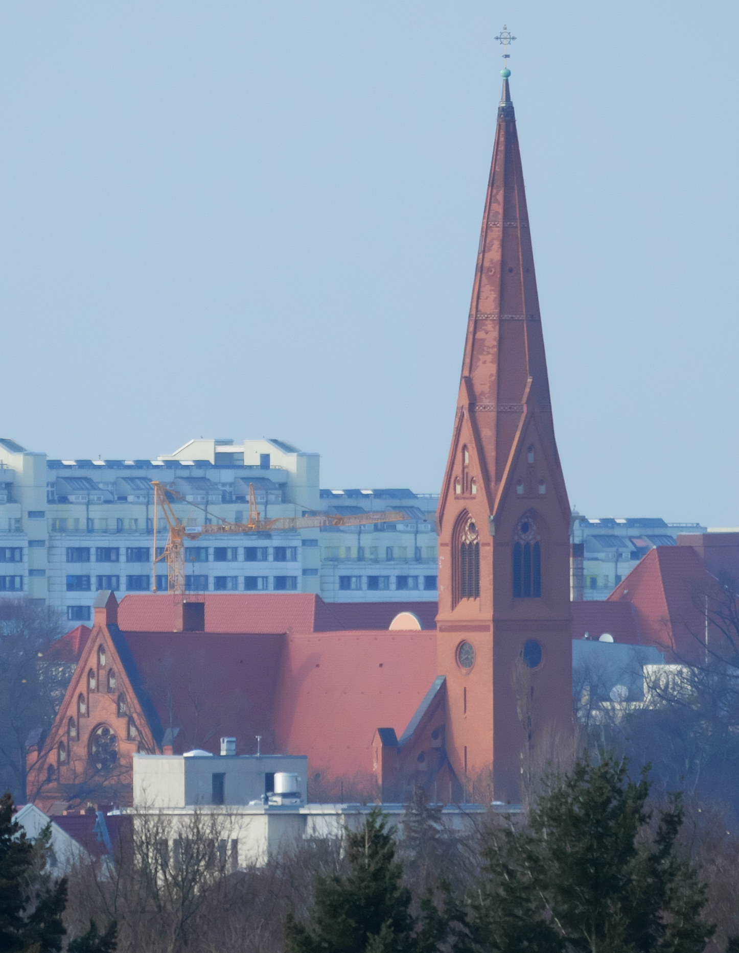 Matthäuskirche in Berlin-Steglitz von Süden gesehen. Im Hintergrund die Autobahnüberbauung Schlangenbader Straße.